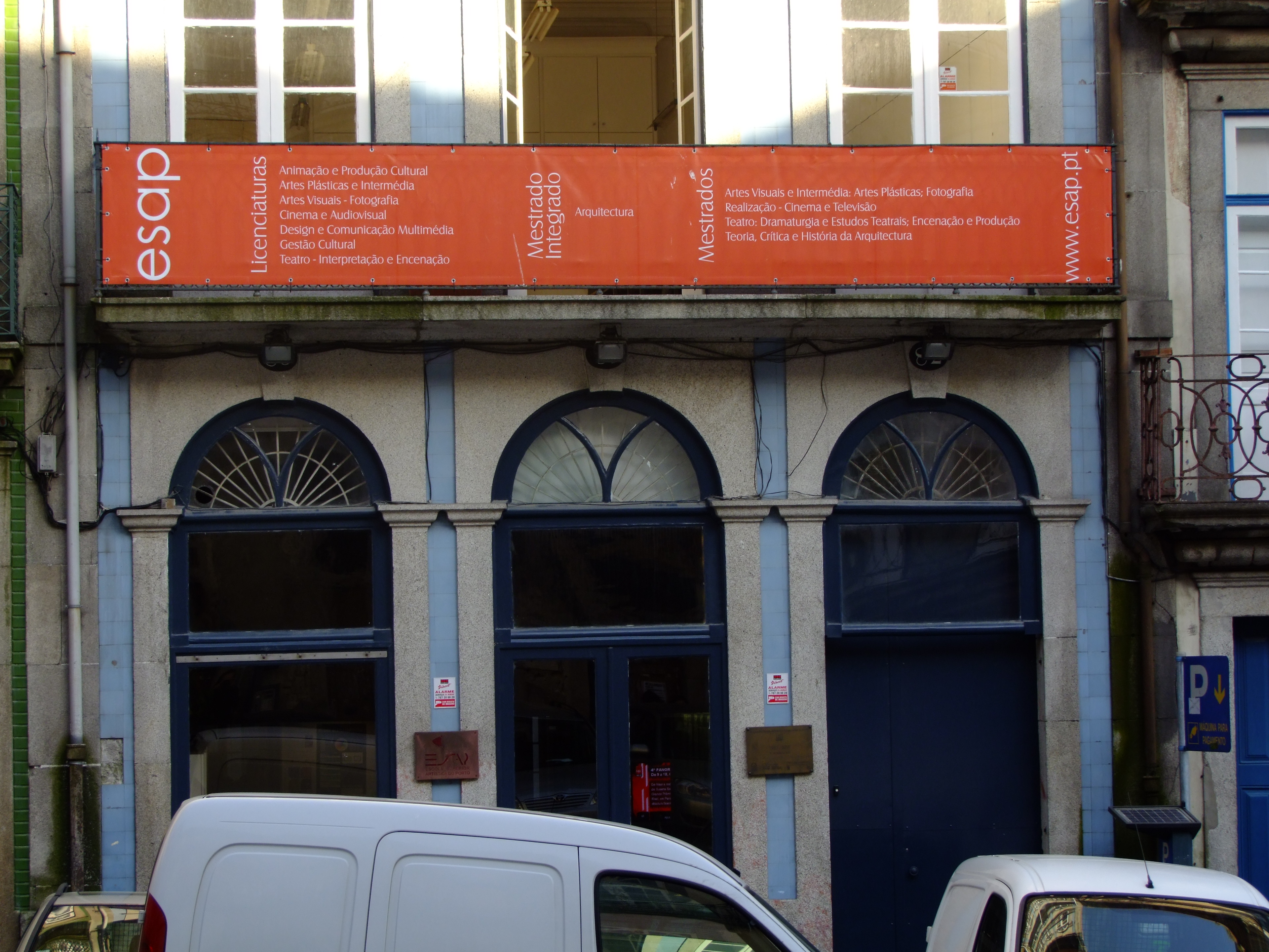 Escola Superior Artística do Porto: sede. Nas freguesias de São Nicolau/Sé, no Porto, Portugal